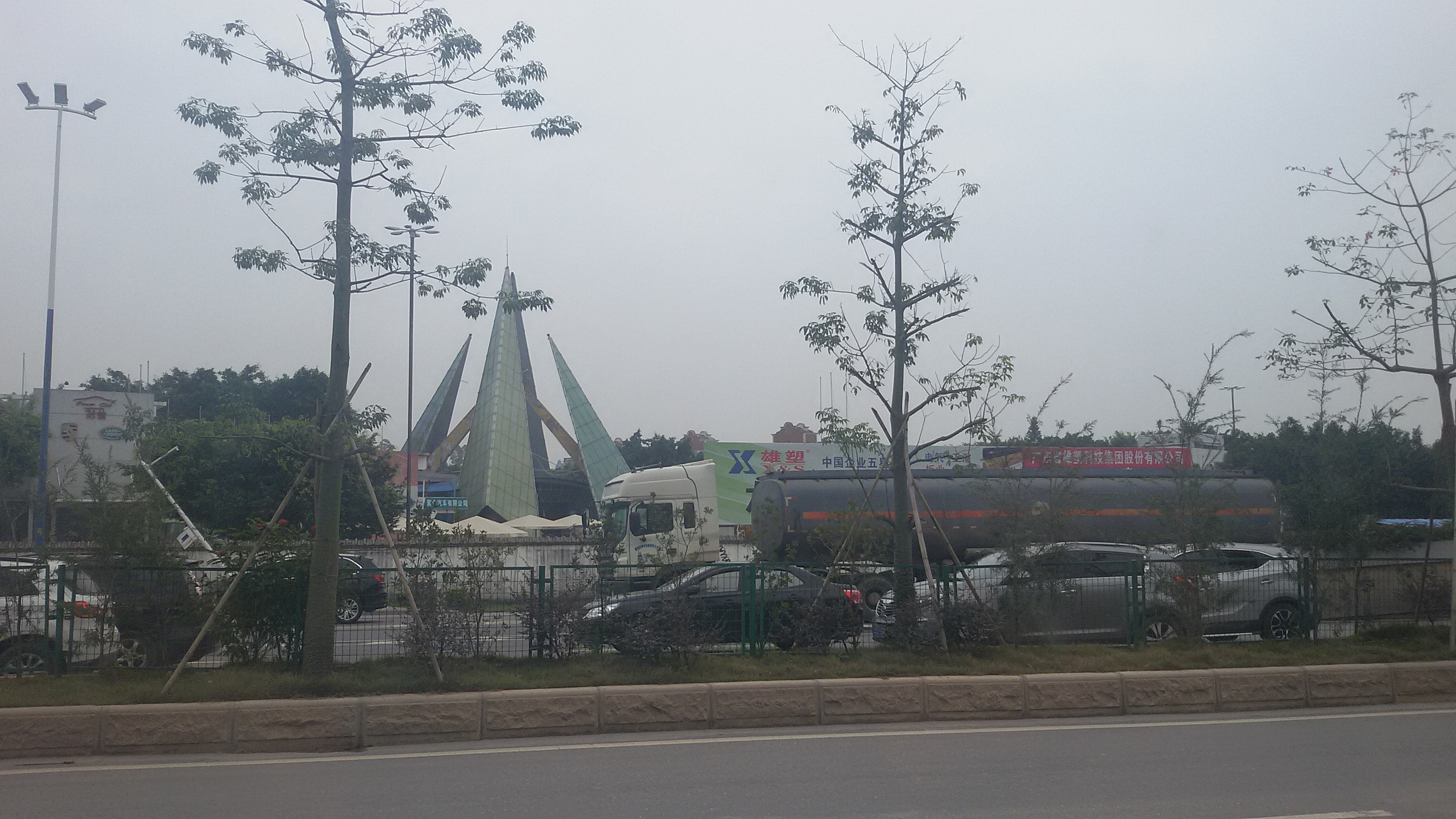 粵語: 荒廢咗嘅航天歡樂世界大門口（2015年12月29號）